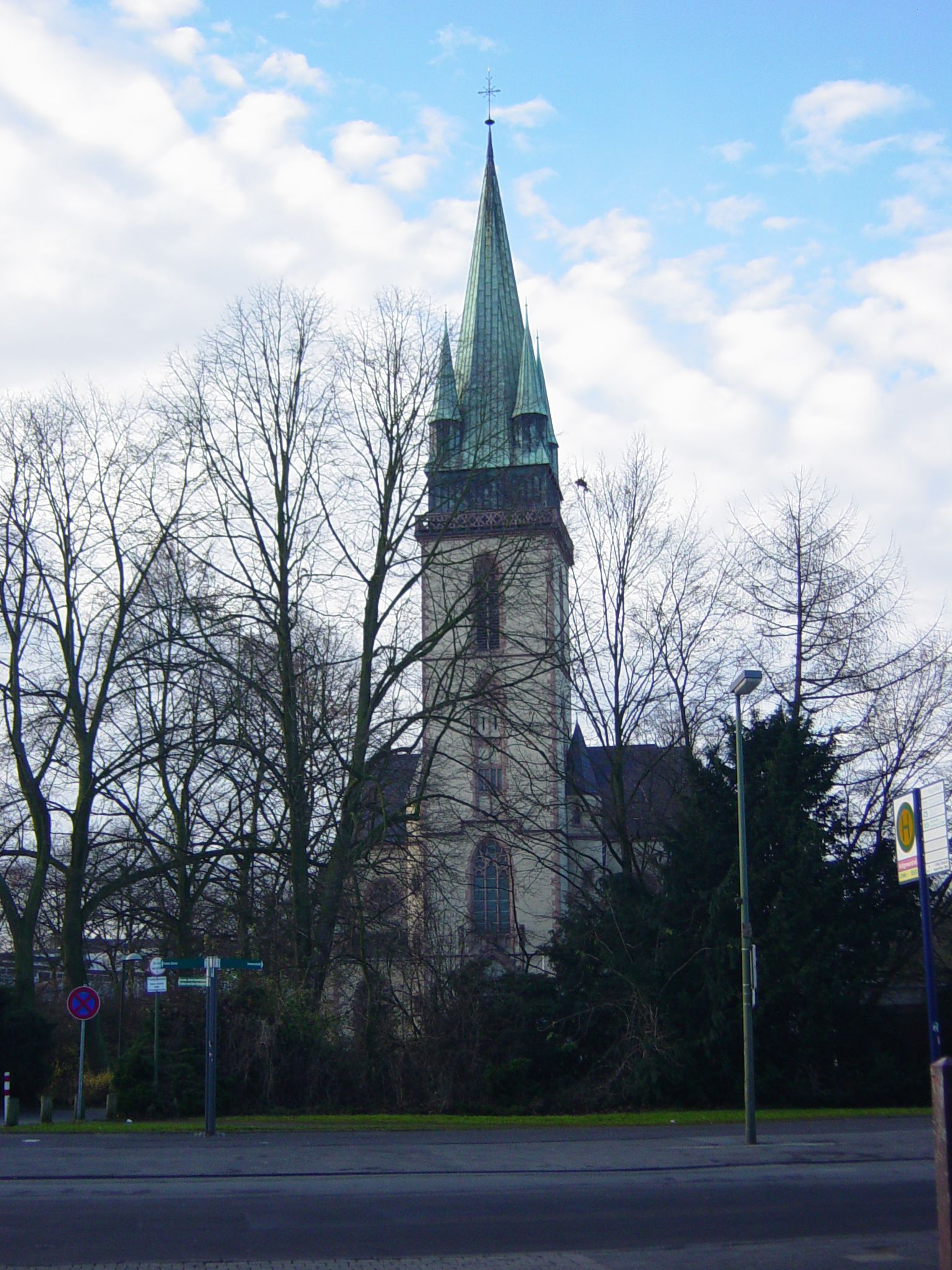 Kath. Herz-Jesu-Kirche in Lünen